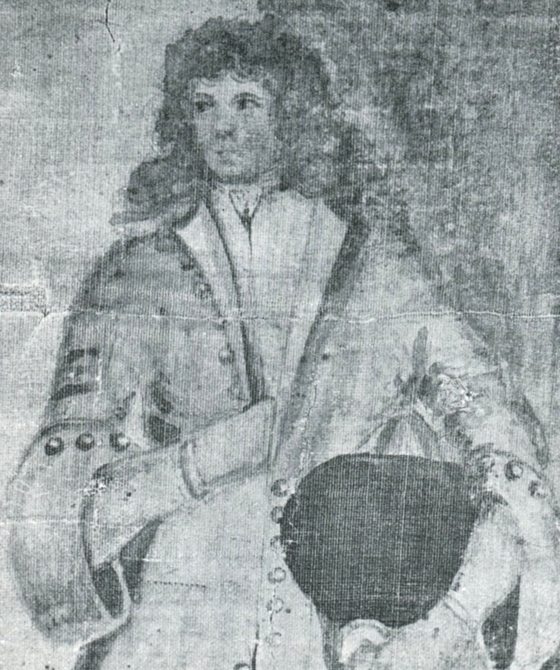 Detalj från Gripenhielms Mälarkarta (Gripenhielm själv)